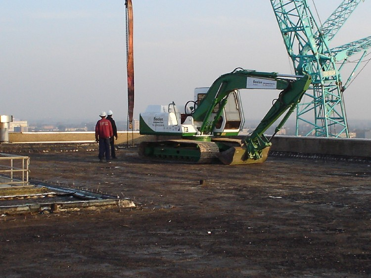 Sloop begint op dak van torenflat voormalig Ziekenhuis Mariastichting in Haarlem